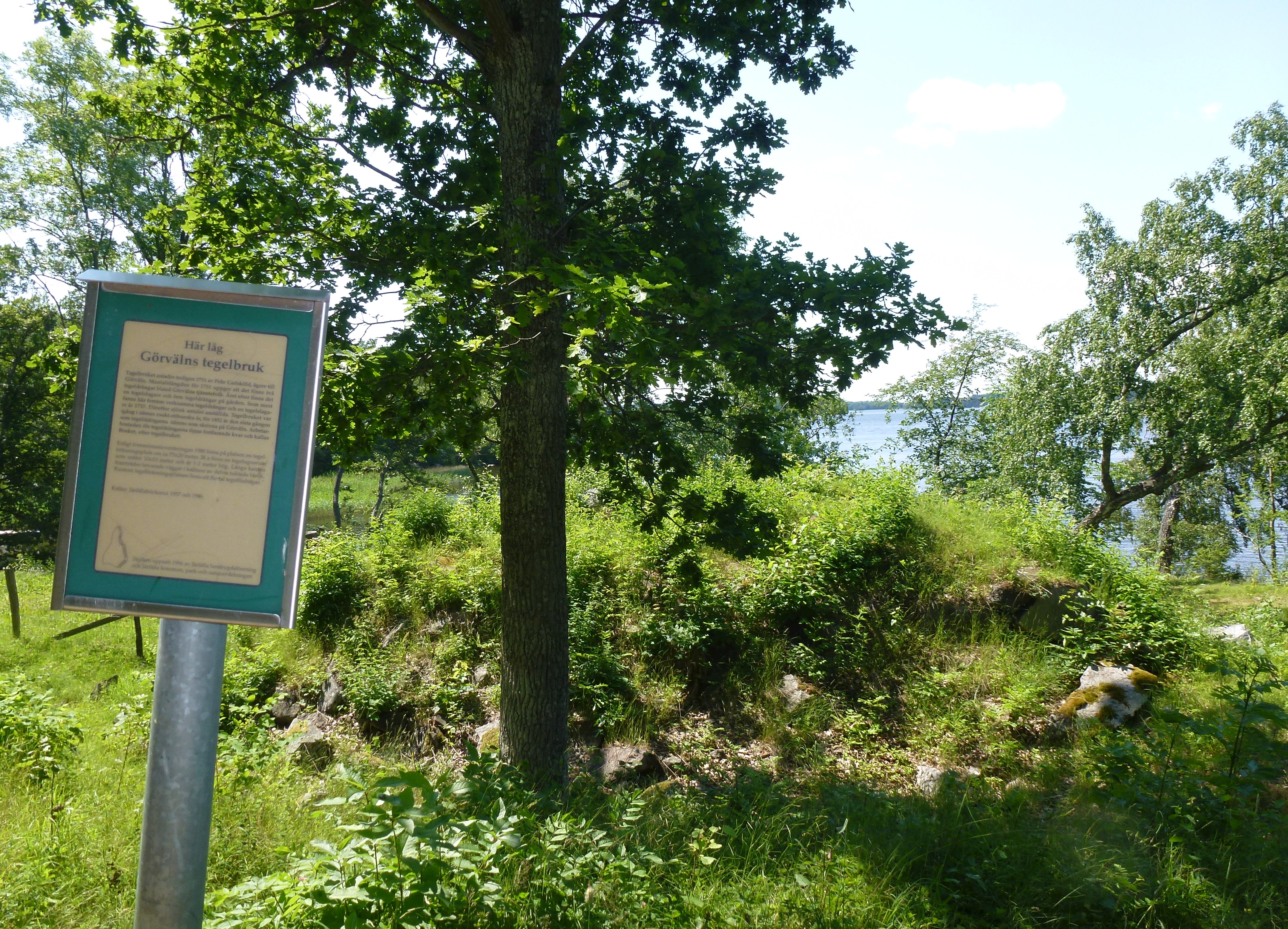 Tegelbruksruinen i Görvälns naturreservat